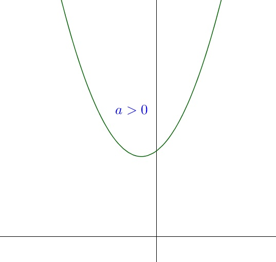 Mostra uma função quadrática com concavidade para cima